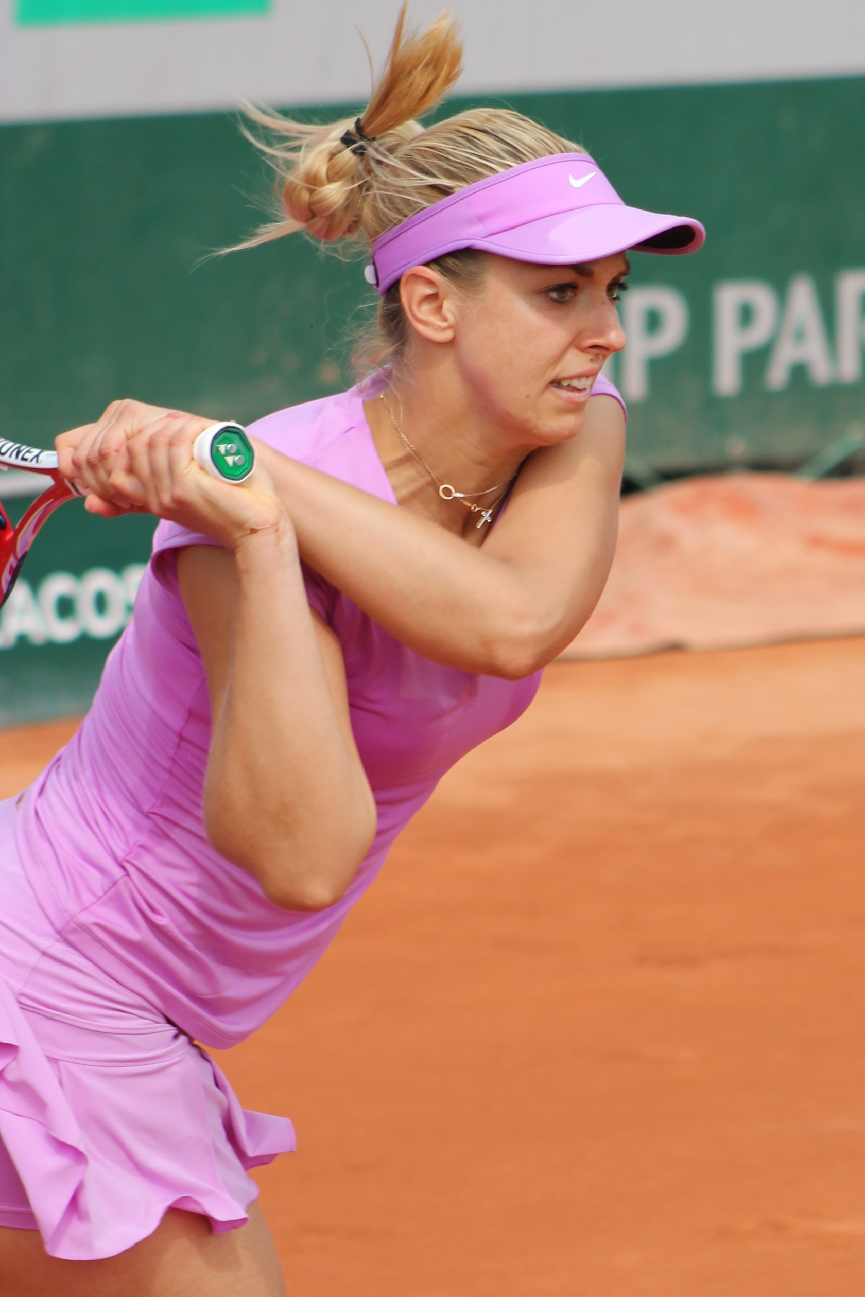 Lisicki RG15 (11)